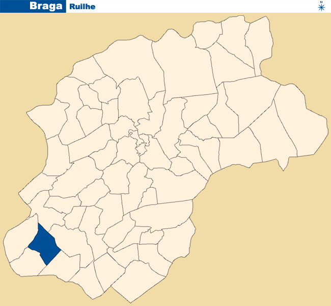 Localização de Ruilhe no concelho de Braga.